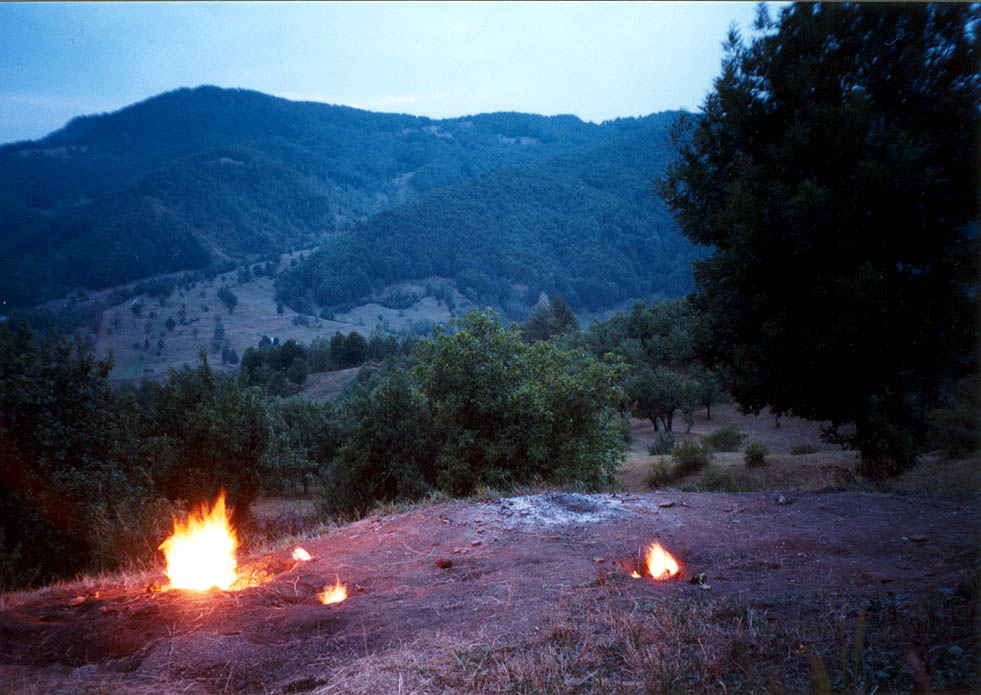 Focul viu near Terca (Buzau County)